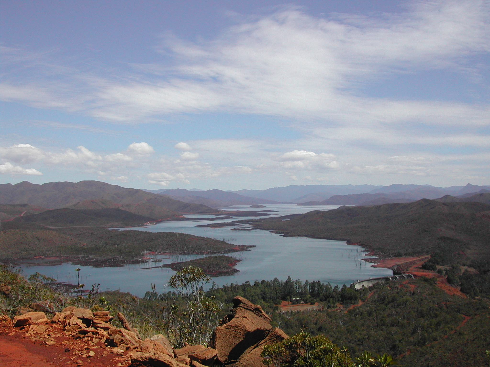 Lac de Yaté